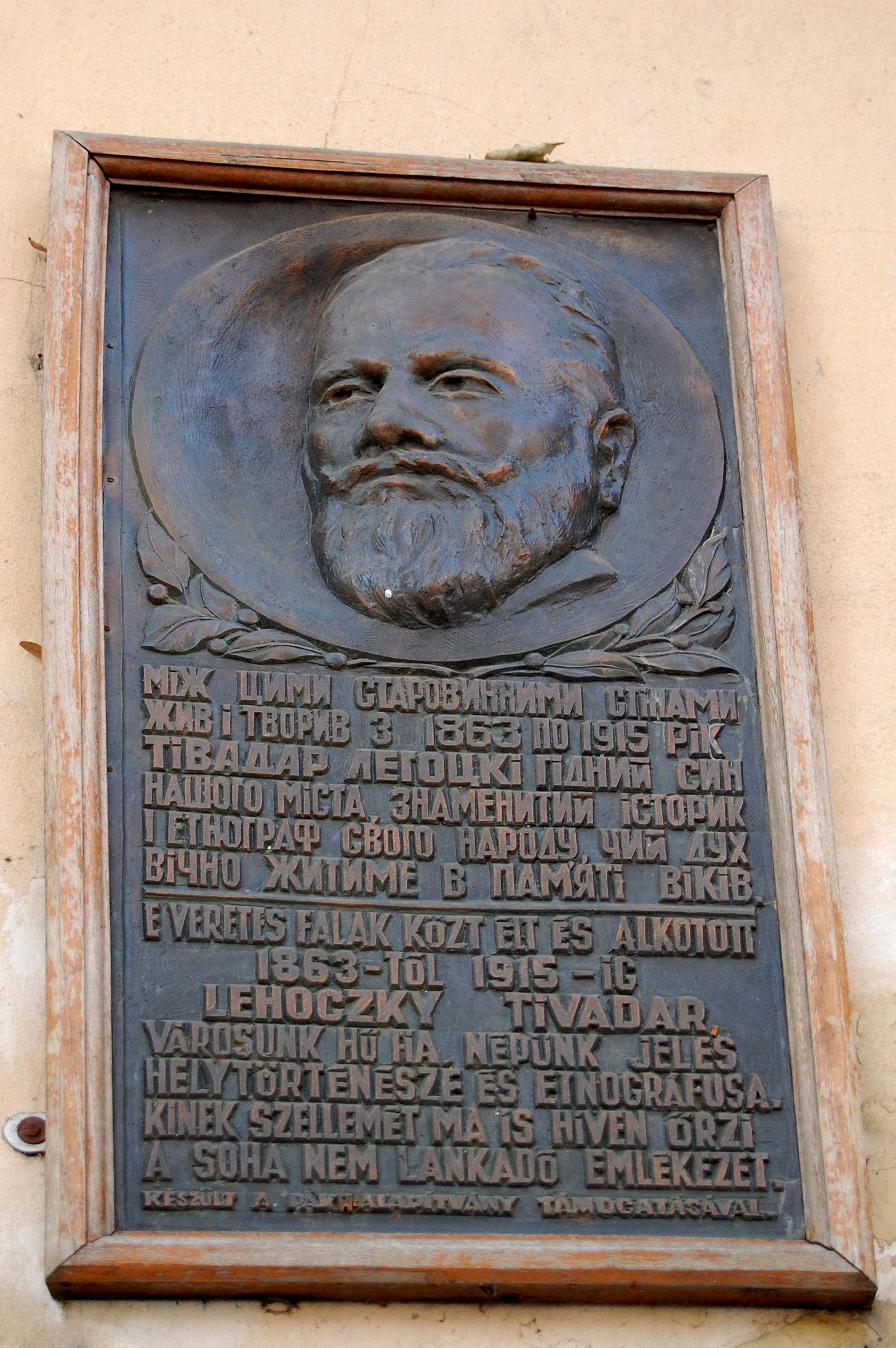 21-104-0085 Меморіальна дошка на будинку, в якому жив закарпатський археолог, історик, краєзнавець Тівадар Легоцький 1987 р. Мукачеве пл. Миру, 28